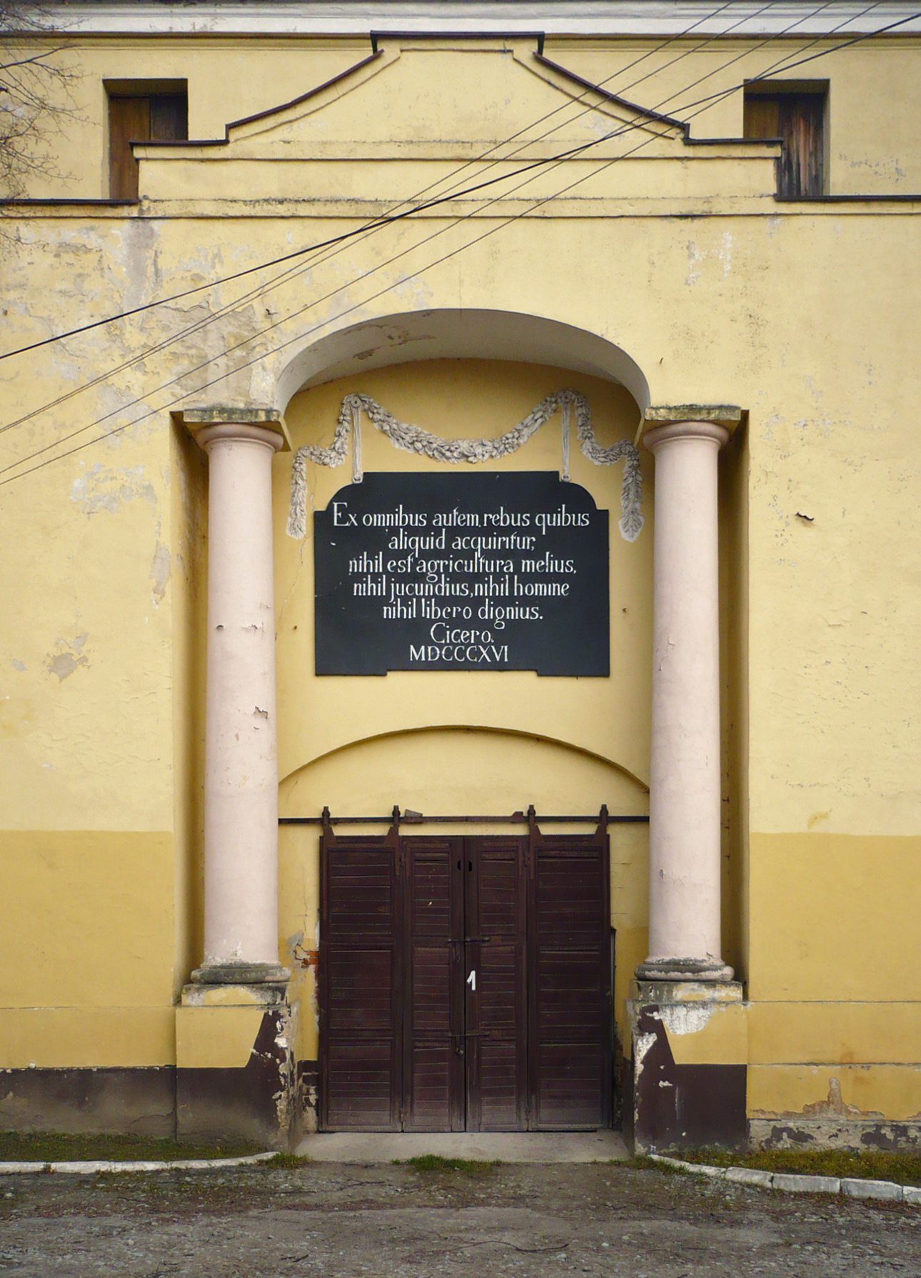 Magazyn zbożowy w Bożkowie. Tablica "Ex omnibus autem rebus quibus aliquid acquiritur nihil est agricultura melius nihil jucundius, nihil homine nihil libero dignius" Cicero, MDCCCXVI. Tłumaczenie napisu na tablicy: "Spośród wszystkich rzeczy, w których jest coś ciekawego, nie ma nic lepszego od rolnictwa, nic przyjemniejszego, nic godnego człowieka wolnego" Cicero, 1816